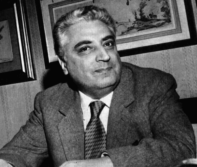 Italian historian Renzo De Felice